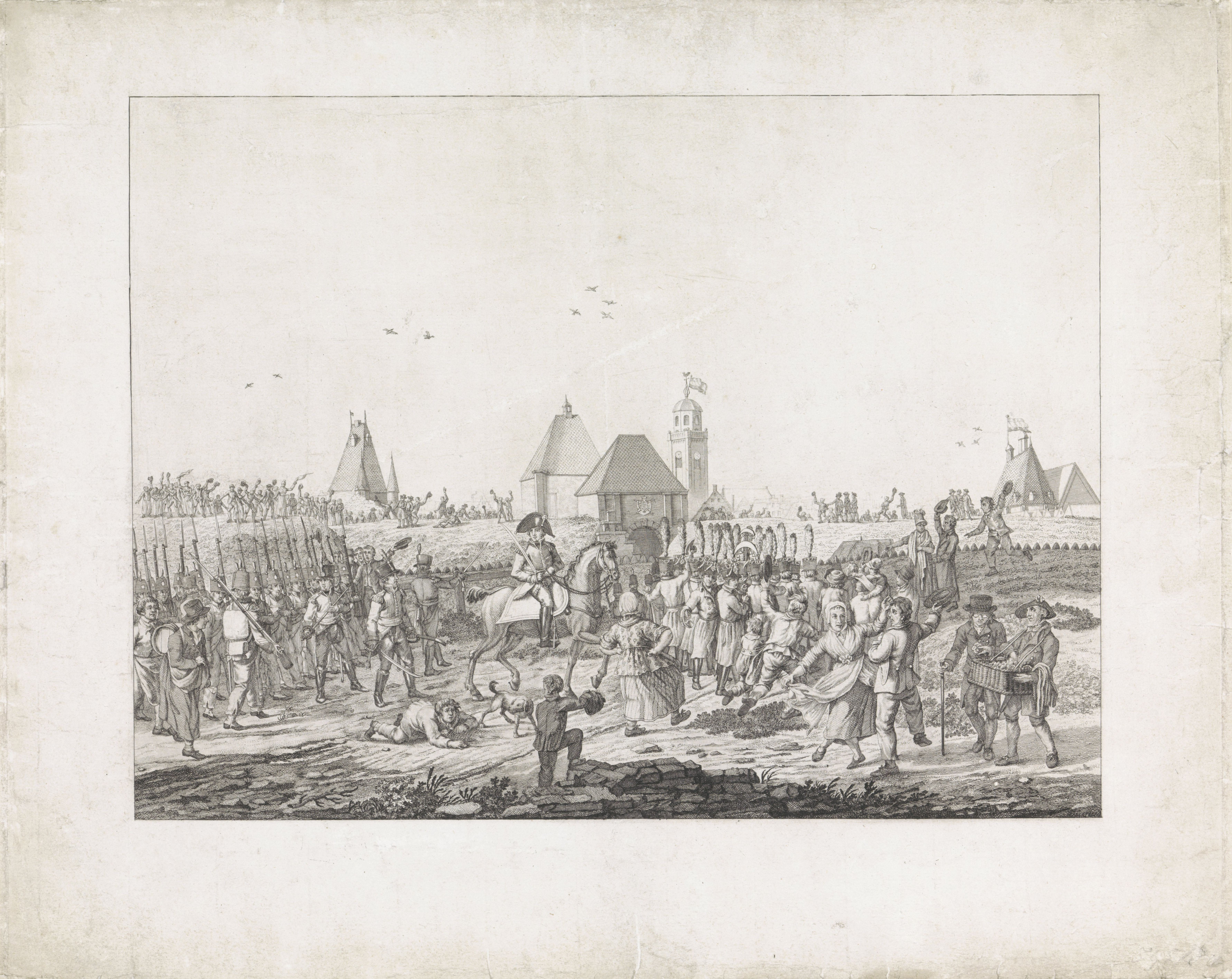 IdentificatieTitel(s): Het inhalen van de Nederlandse bezetting door het korps burger muzikanten binnen Deventer, 26 april 1814Objecttype: prent Objectnummer: RP-P-1910-1230Catalogusreferentie: FMH 5954Opschriften / Merken: verzamelaarsmerk, verso, gestempeld: Lugt 2228Omschrijving: Het inhalen der Nederlandsche bezetting door het corps burgermuzikanten binnen Deventer, op 26 april 1814. Een Nederlandse bataljon infanterie voorafgegaan door een officier (Baron Sweerts de Landas) te paard wordt door een muziekkorps de stad ingeleid. Met juichende mensen voor de wallen van Deventer. Zichtbaar zijn van links naar rechts: de Midden- of Binnenbrinkpoort, de oude Binnenbrinkpoort en de toren van de Lebuïnuskerk aan het Grote Kerkhof (met vlag) en de Broederenkerk. Rechts een joodse marskramer.VervaardigingVervaardiger: prentmaker: Theodoor Koningnaar tekening van: Nicolaas SonnenbergPlaats vervaardiging: NederlandDatering: 1814Fysieke kenmerken: ets, proefdruk vóór de letterMateriaal: papier Techniek: etsenAfmetingen: plaatrand: h 388 mm × b 481 mmOnderwerpWat: troop movements, transportationWanneer: 1814-04-26 - 1814-04-26Waar: DeventerWie: Jacob Dirk baron Sweerts de LandasVerwerving en rechtenVerwerving: aankoop 1910Copyright: Publiek domein